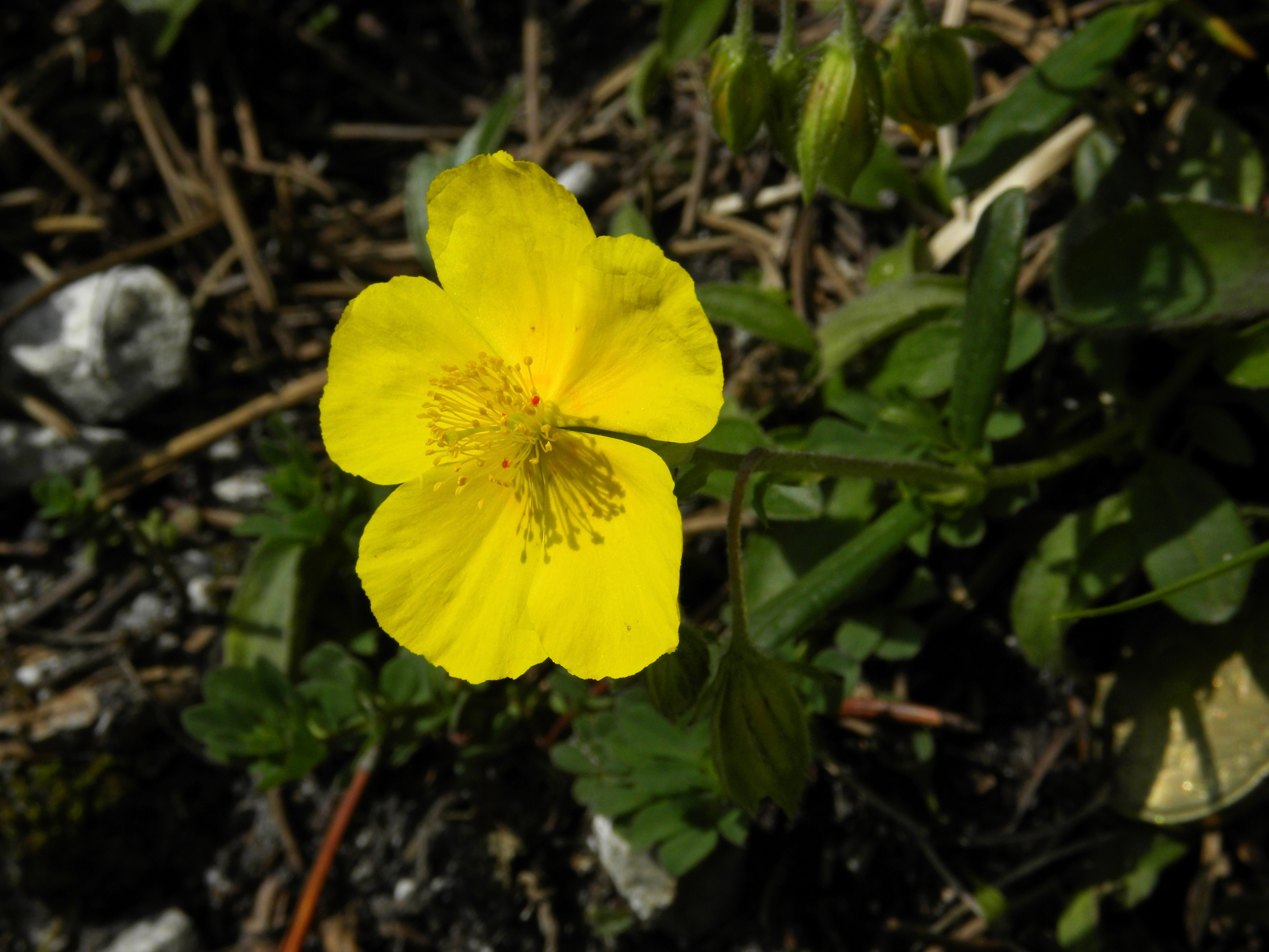 Ein Alpen-Sonnenröschen (Helianthemum alpestre) auf der Rax